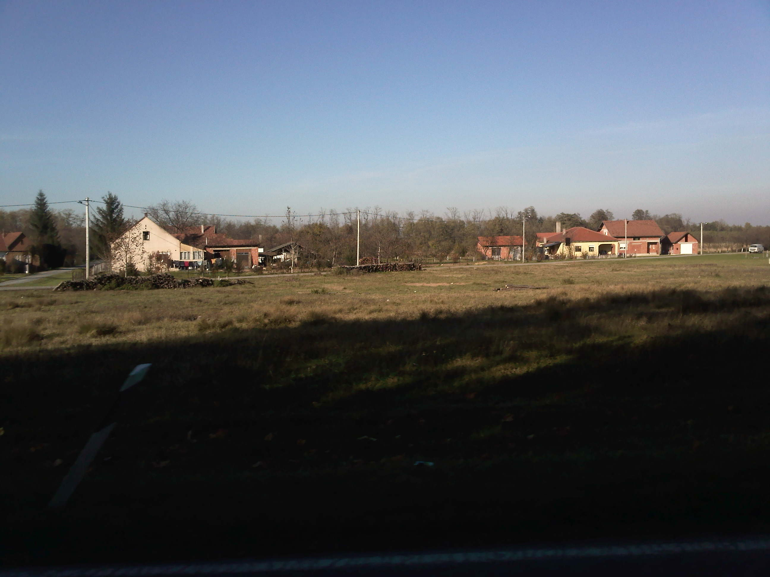 Donja Motičina